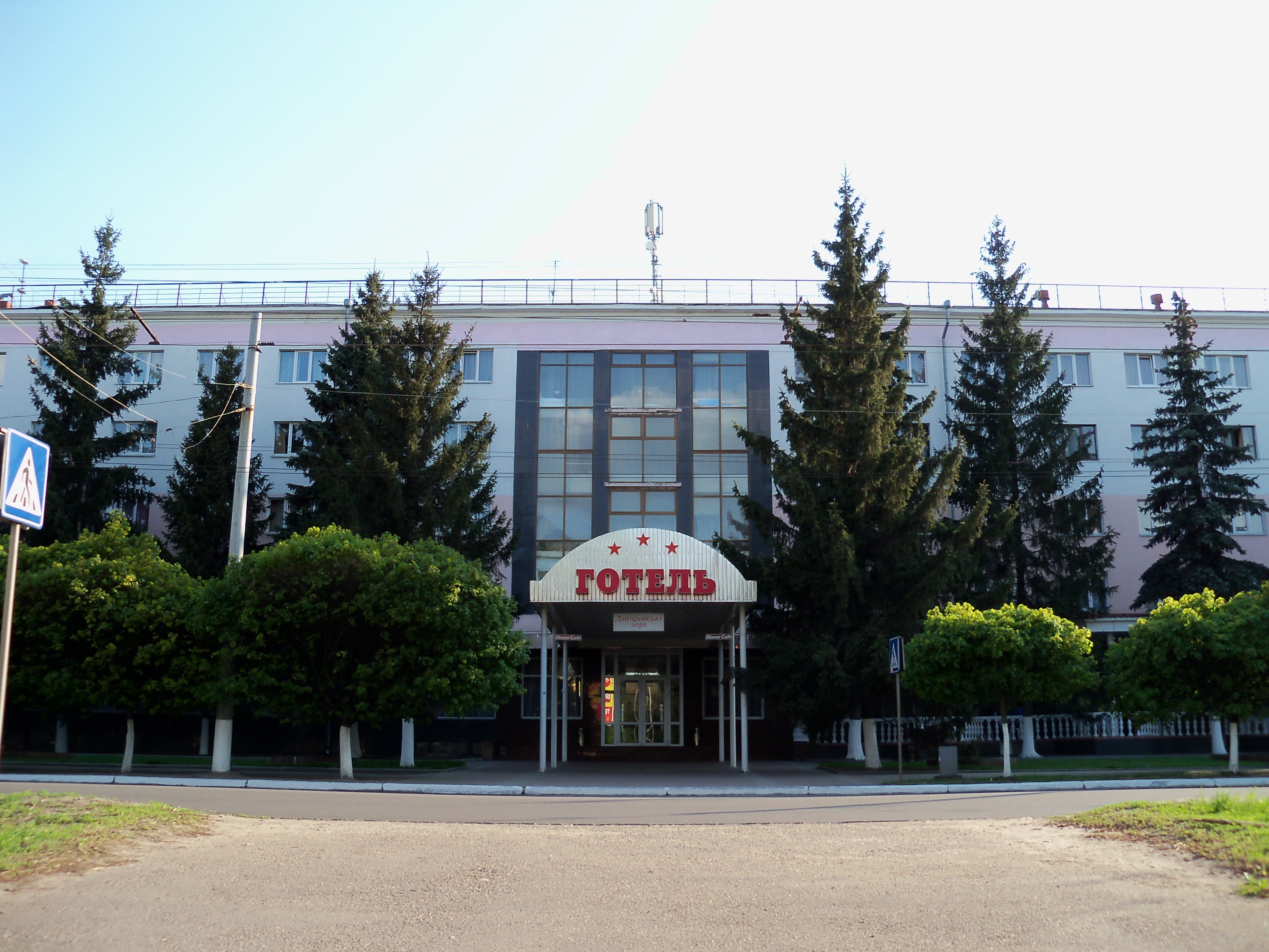 Дніпровські зорі: Готель у Кременчуці